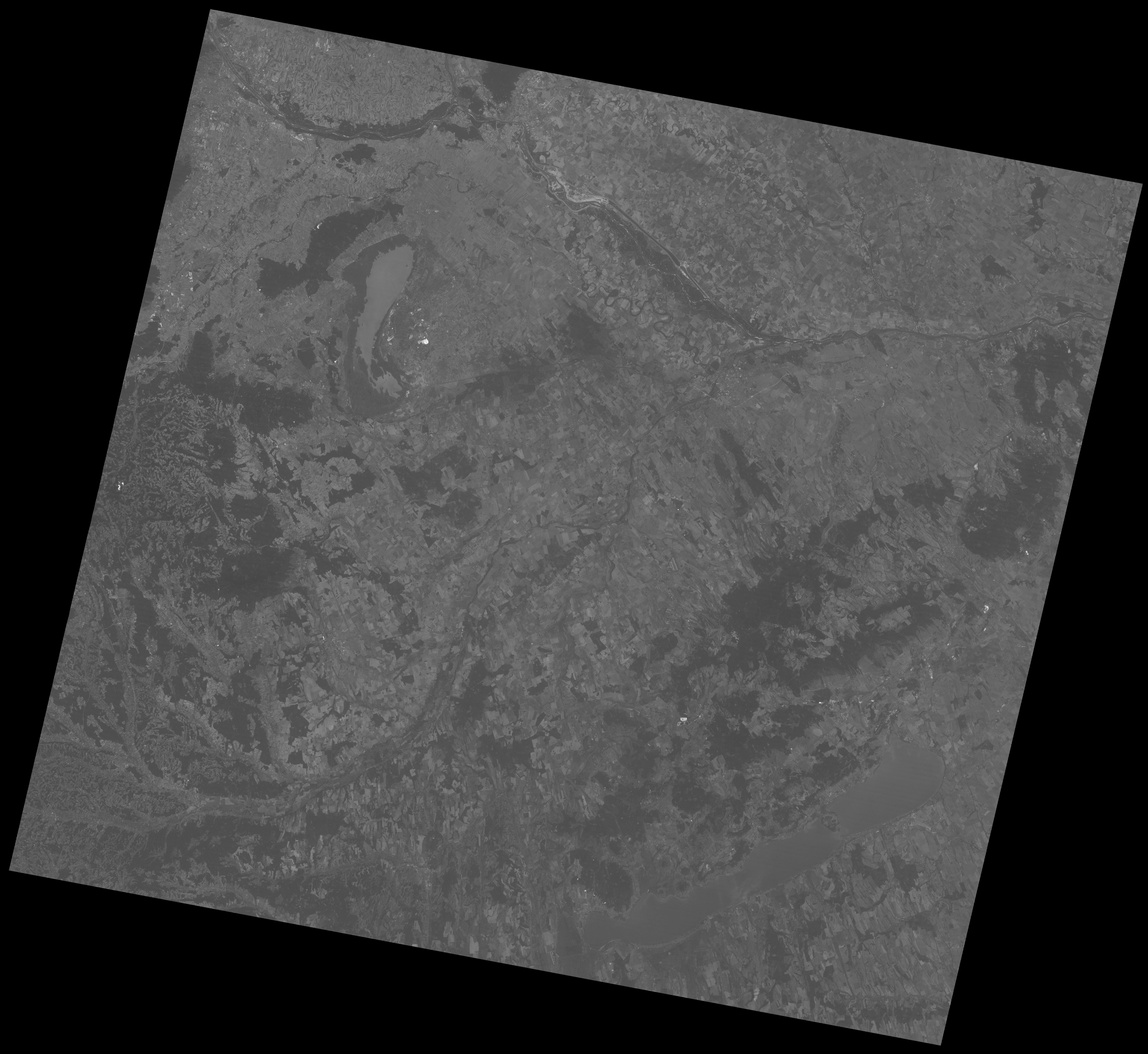 A Landsat-5 felvétele az Észak-Dunántúlról a kék (1-es) sávban